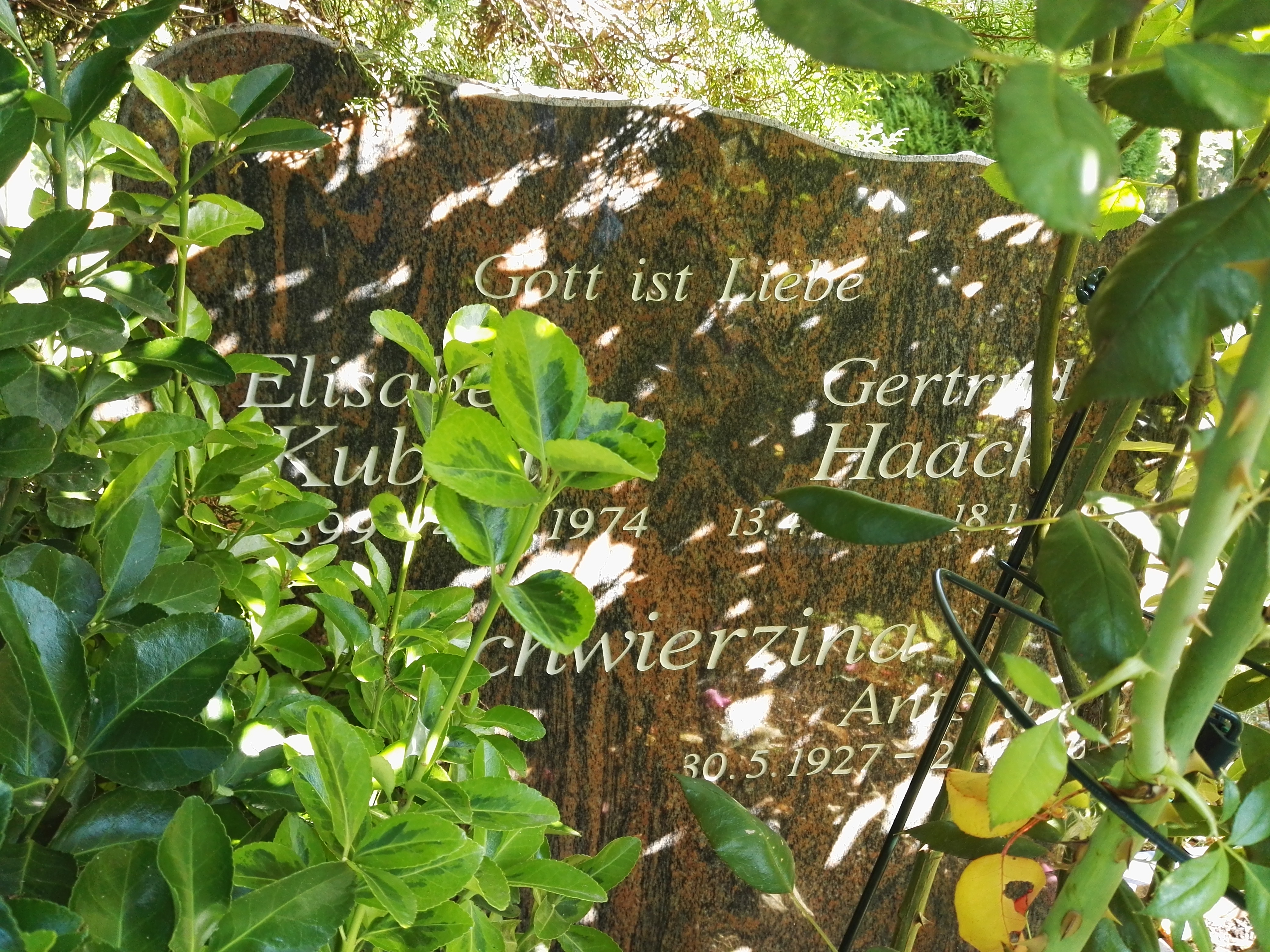 Grab von Tino Schwierzina auf dem St.-Hedwig-Friedhof II in Berlin-Weißensee